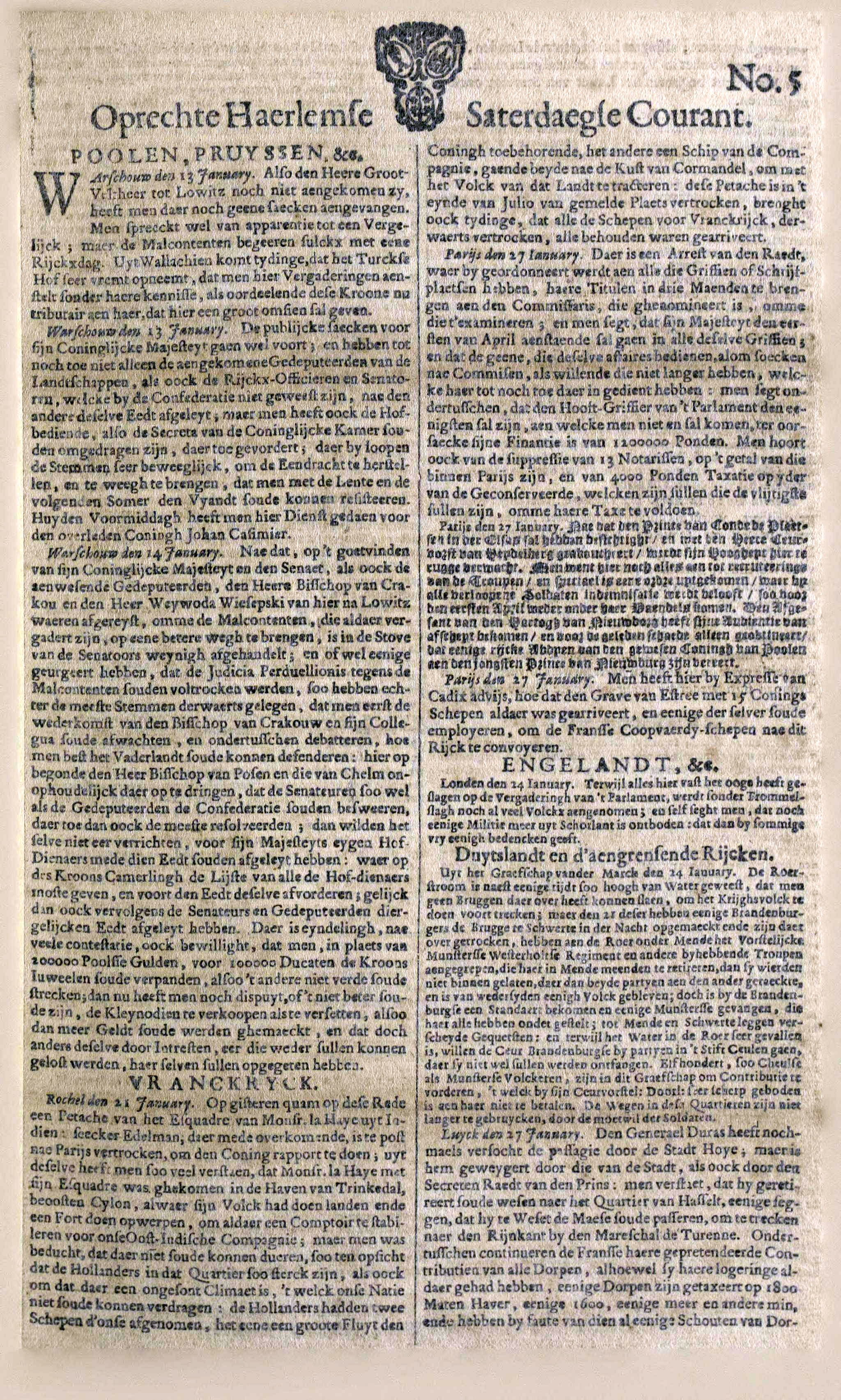 Opregte Haarlemsche Courant, 1673-02-04